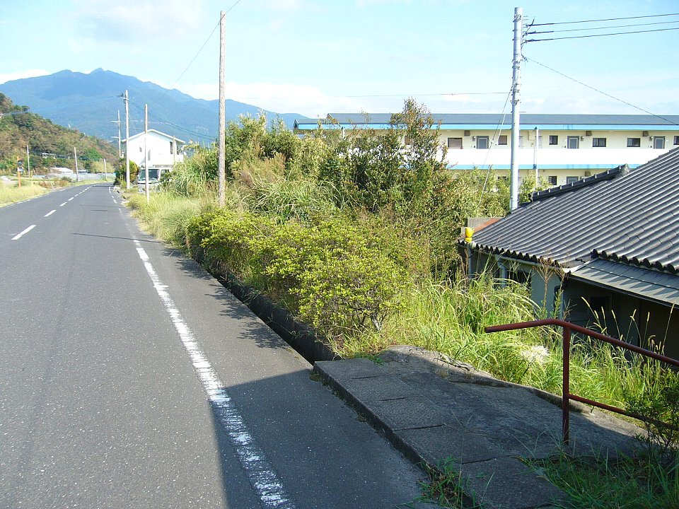 大隅線柊原駅跡 右手前の階段が入口。右前方の叢の位置にホームがあった。